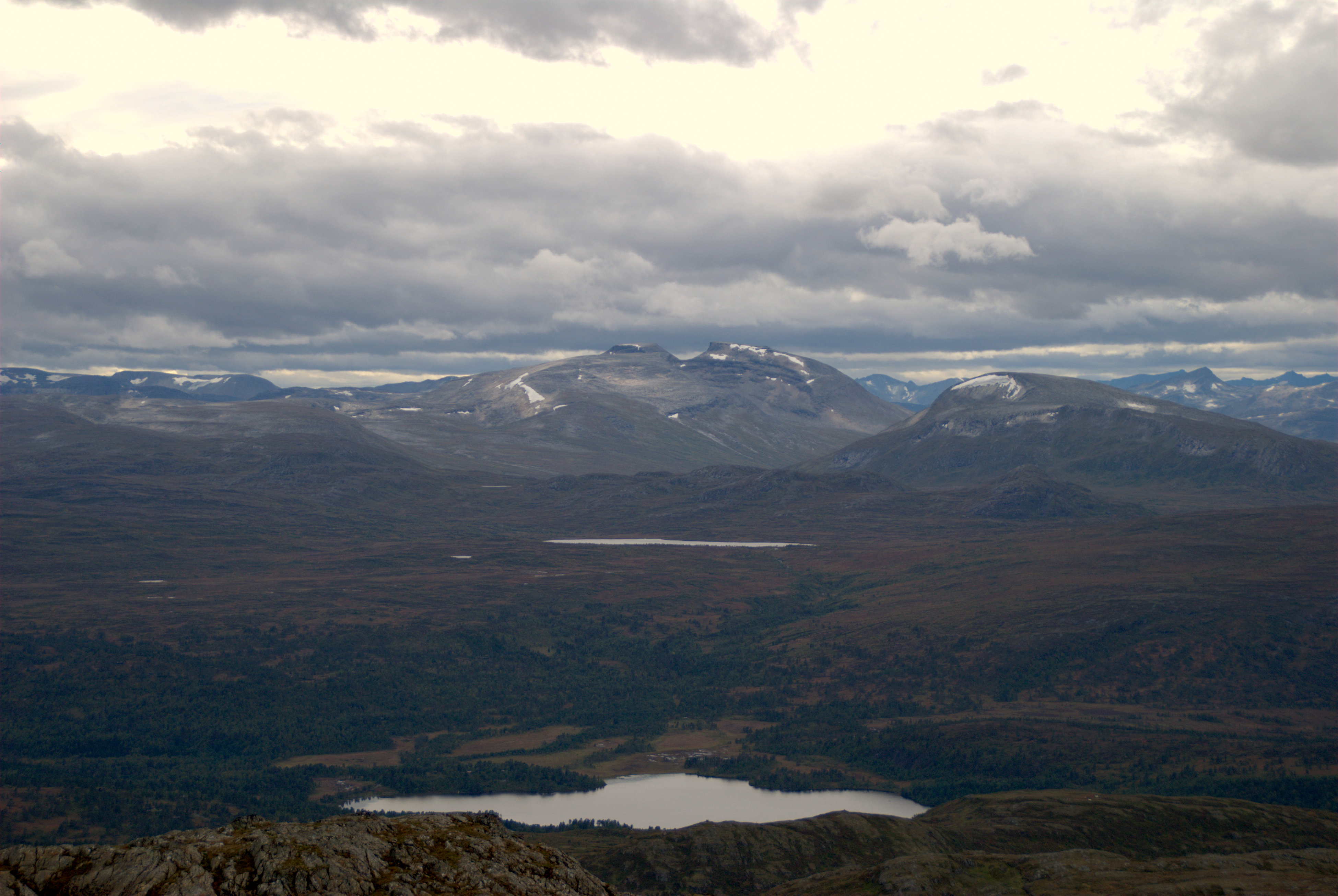 Resvatnet med Trollhetta (bak) Rindhatten (høyre) i Trollheimen sett fra Resfjellet i Meldal, Sør-Trøndelag.